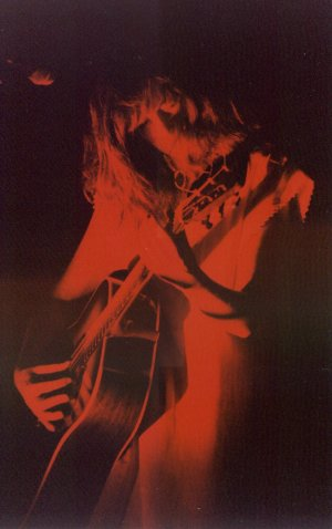 Cristina Donà in concerto a Urbino, Cortile Raffaello, 2 agosto 1998